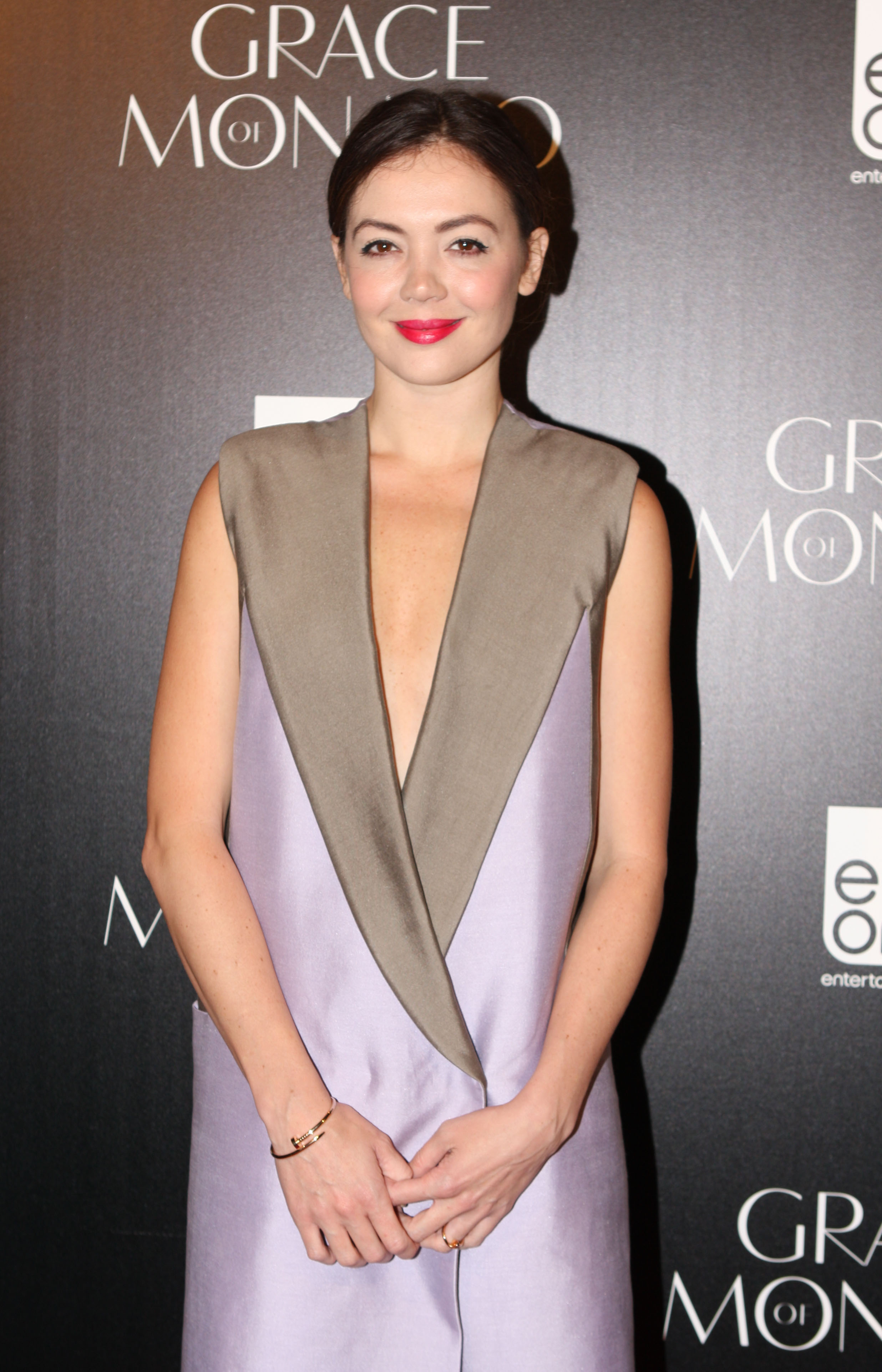 Emma Lung à la première de Grace of Monaco